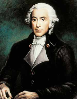 Abraham-Louis Perrelet (1729-1826)